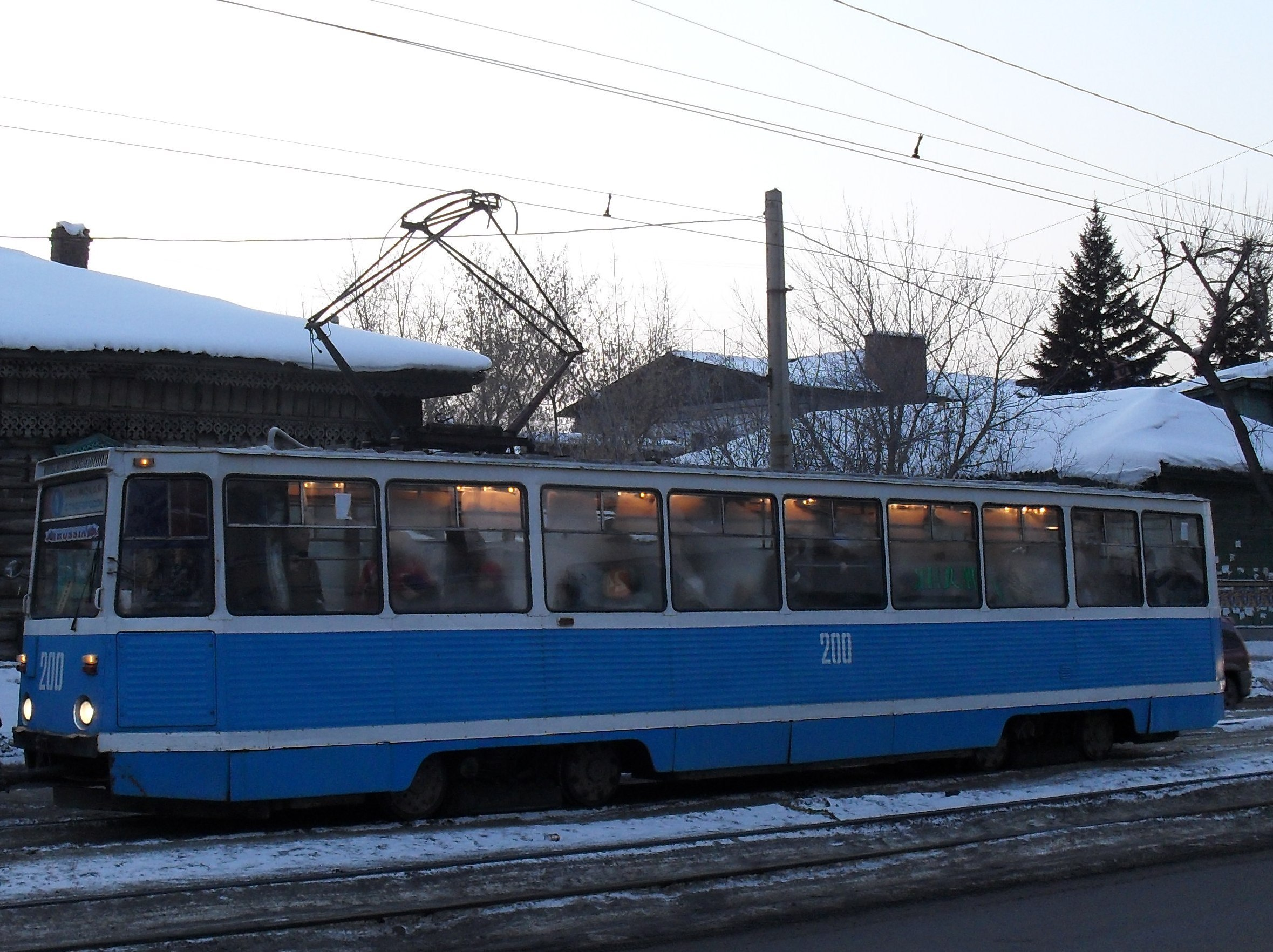 Иркутск. Трамвай на улице Партизанская.